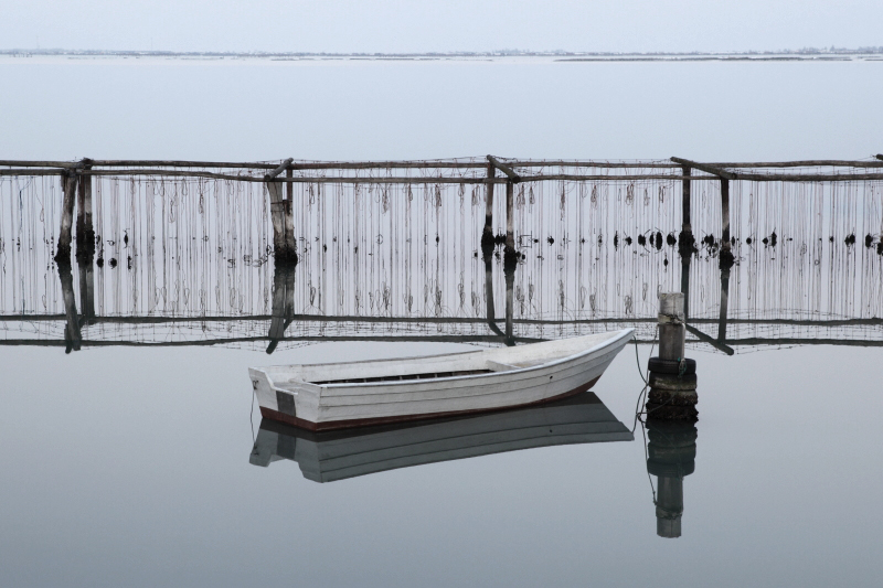 Impianto usato tradizionalmente per l'allevamento e la produzione delle cozze a Scardovari - Italia